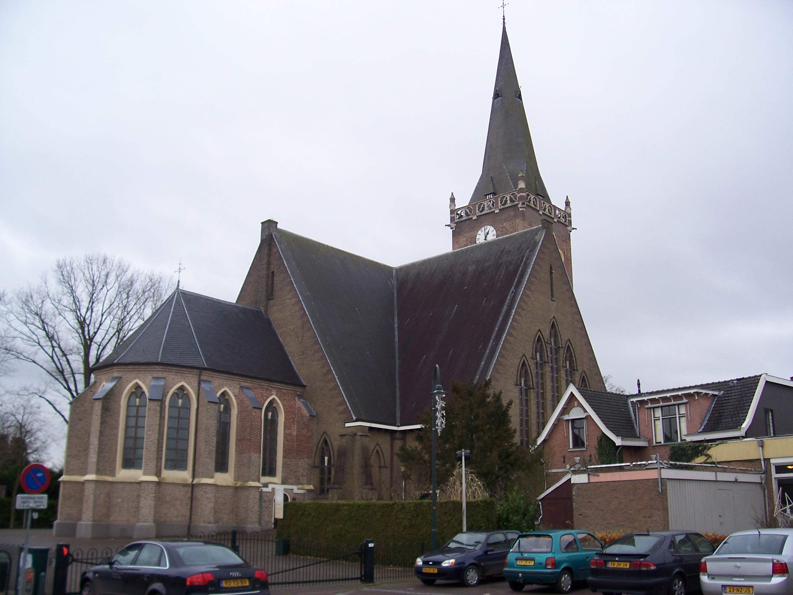 Johanneskerk Heerde, Nederland.